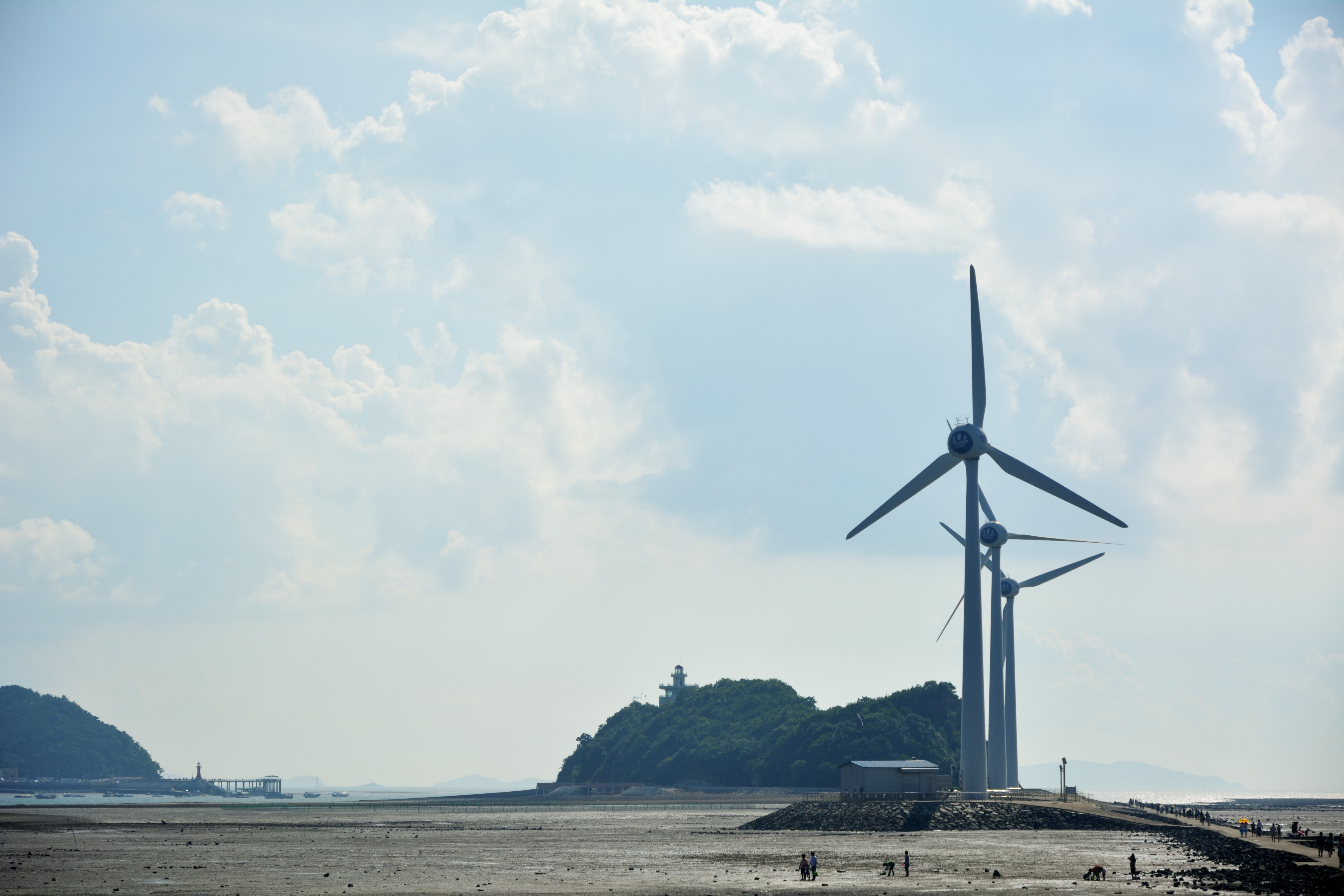 대부도에서 바라본 누에섬. 갯벌 위로 풍력 터빈이 보인다.